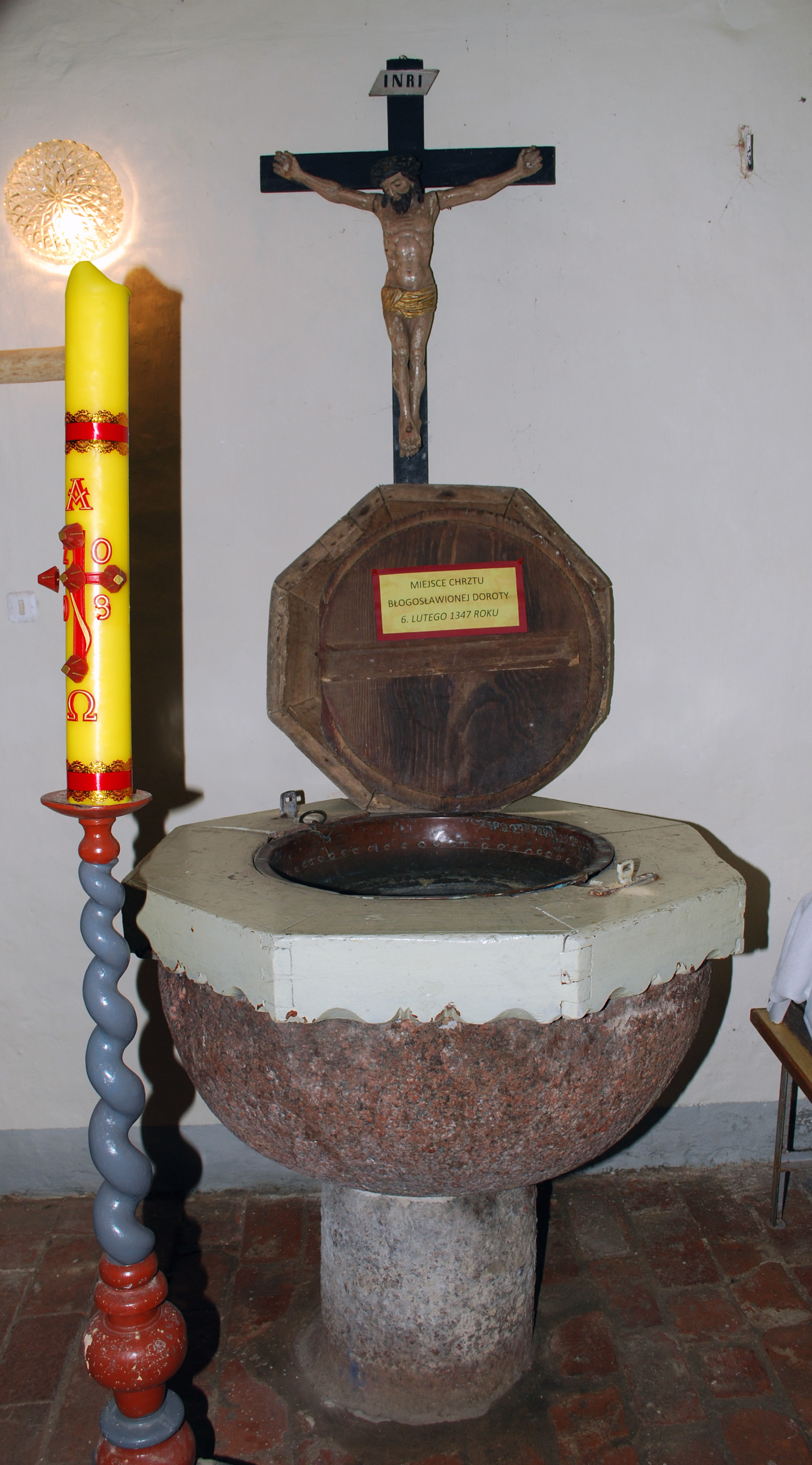 Kościół we wsi Mątowy Wielkie, chrzcielnica Doroty z Mątowów.